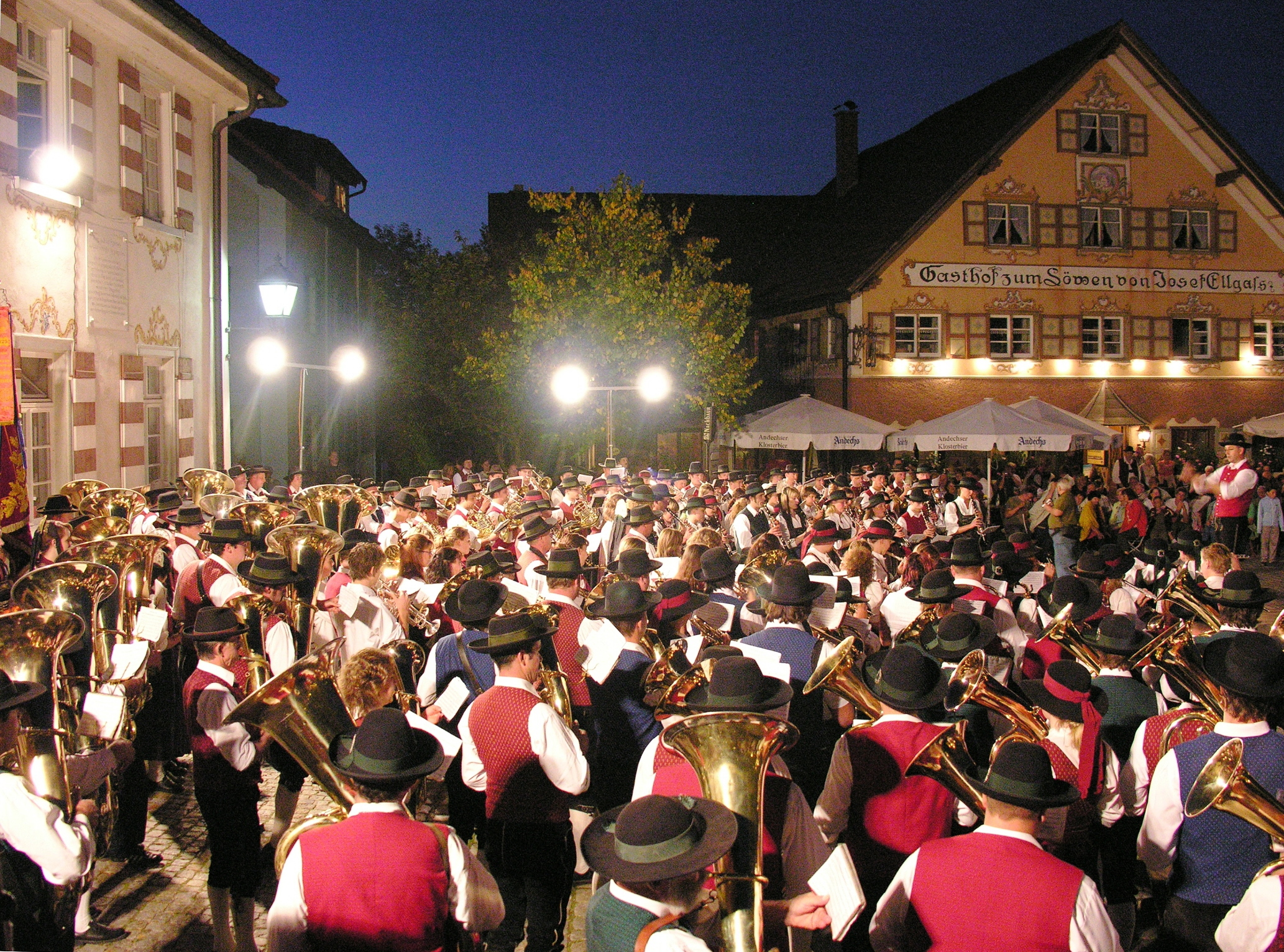 Sommerabendkonzert in Eglofs, Musikkapellen